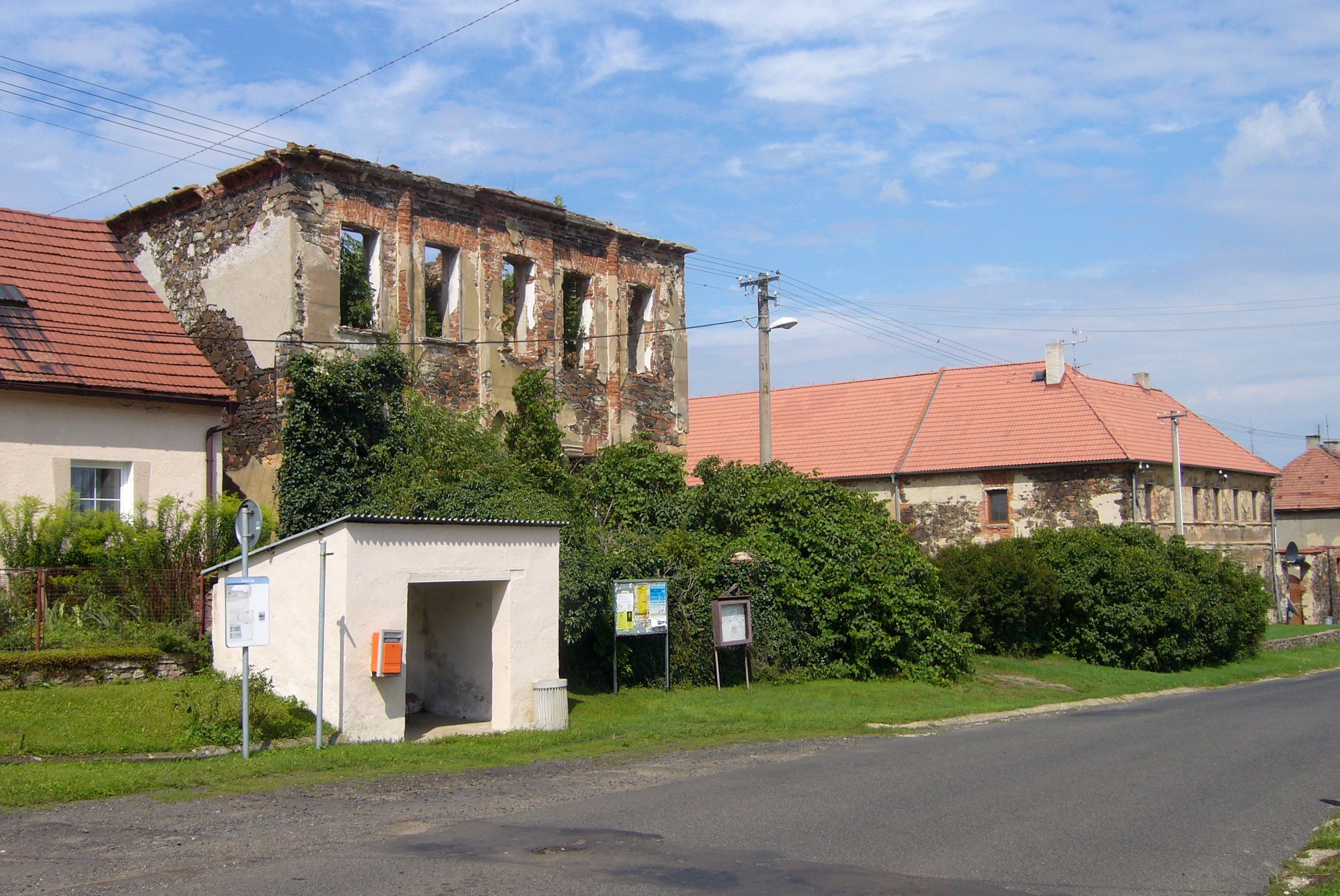 Východní strana návsi